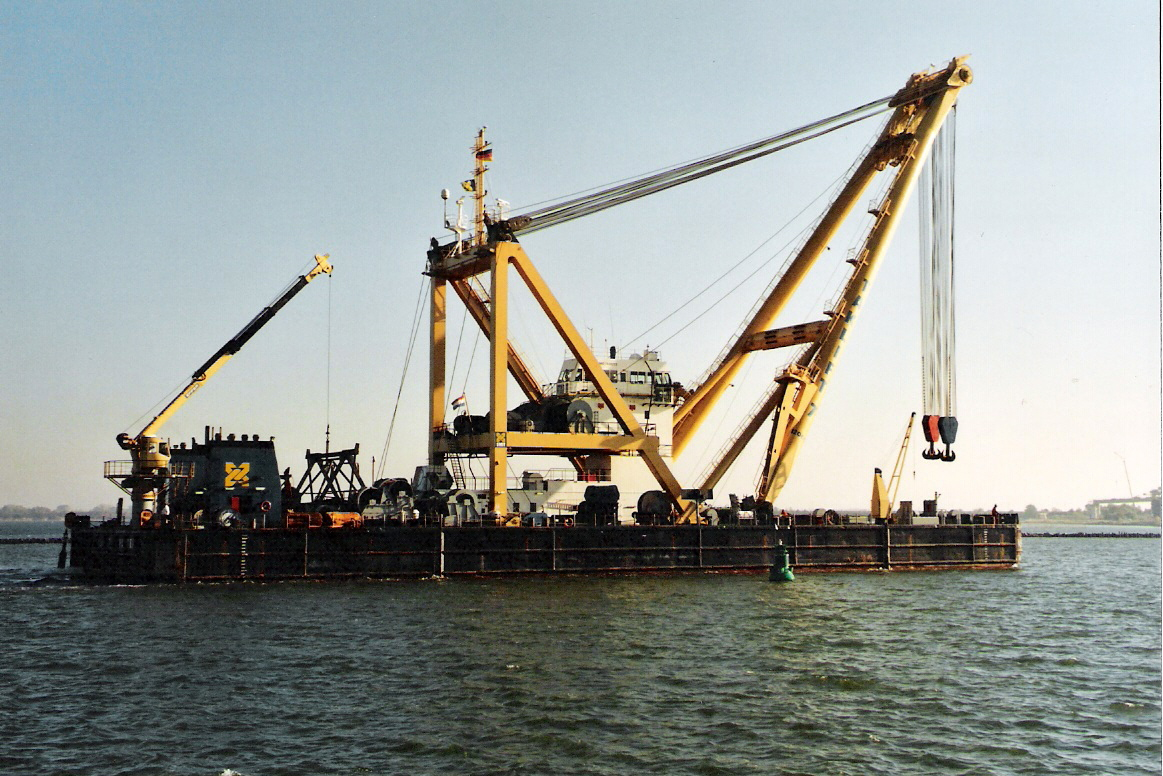 Autor: Benutzer:Klugschnacker, Schwimmkran Taklift 7 aus Rotterdam im Stralsunder Hafen (2005-10-29).